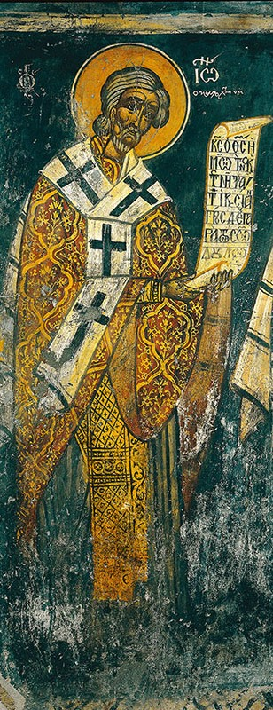 Μητρόπολη Θήβας